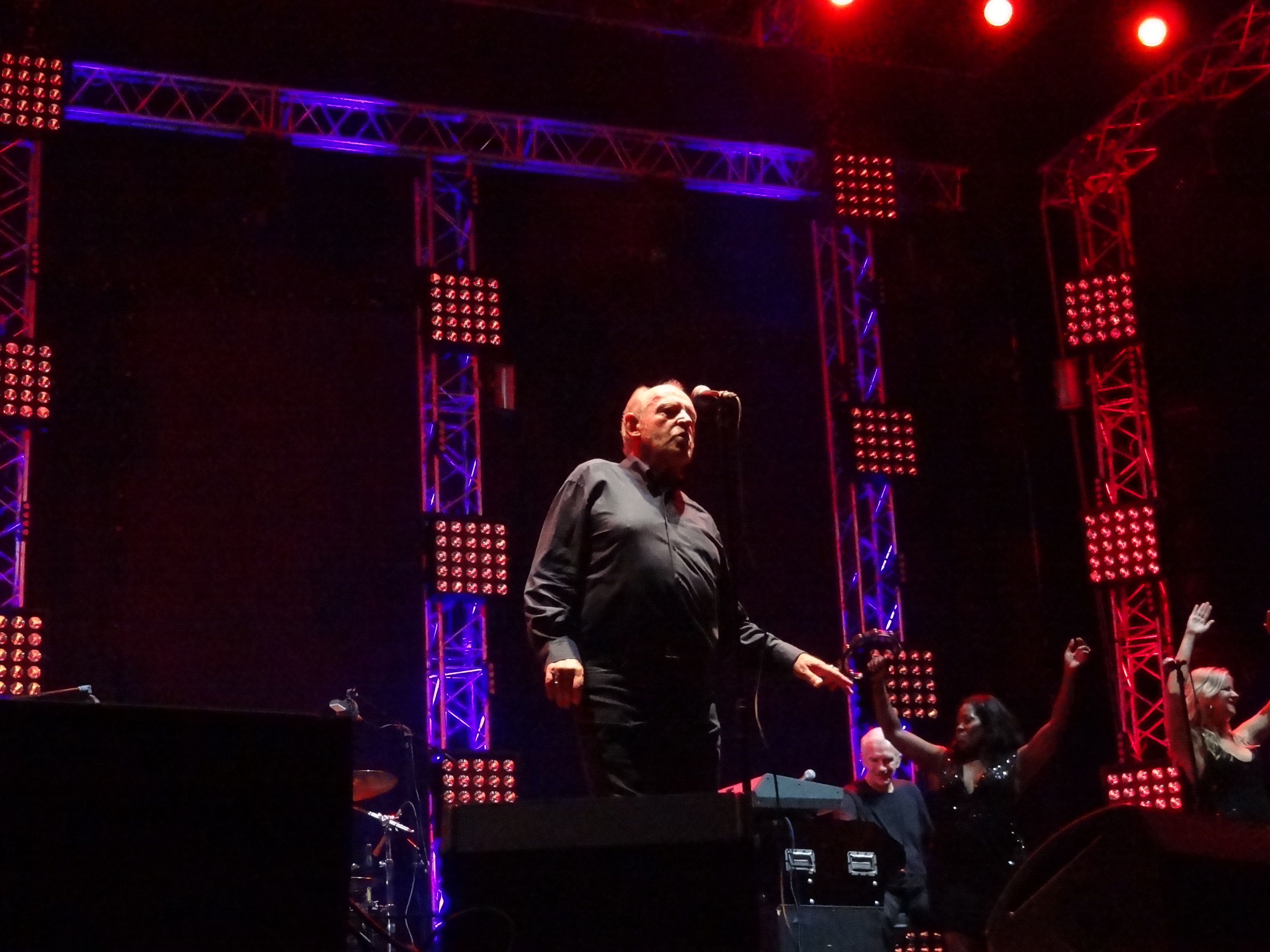 Концерт британского певца Джо Кокера в рамках X Международного инвестиционного форума в Сочи.